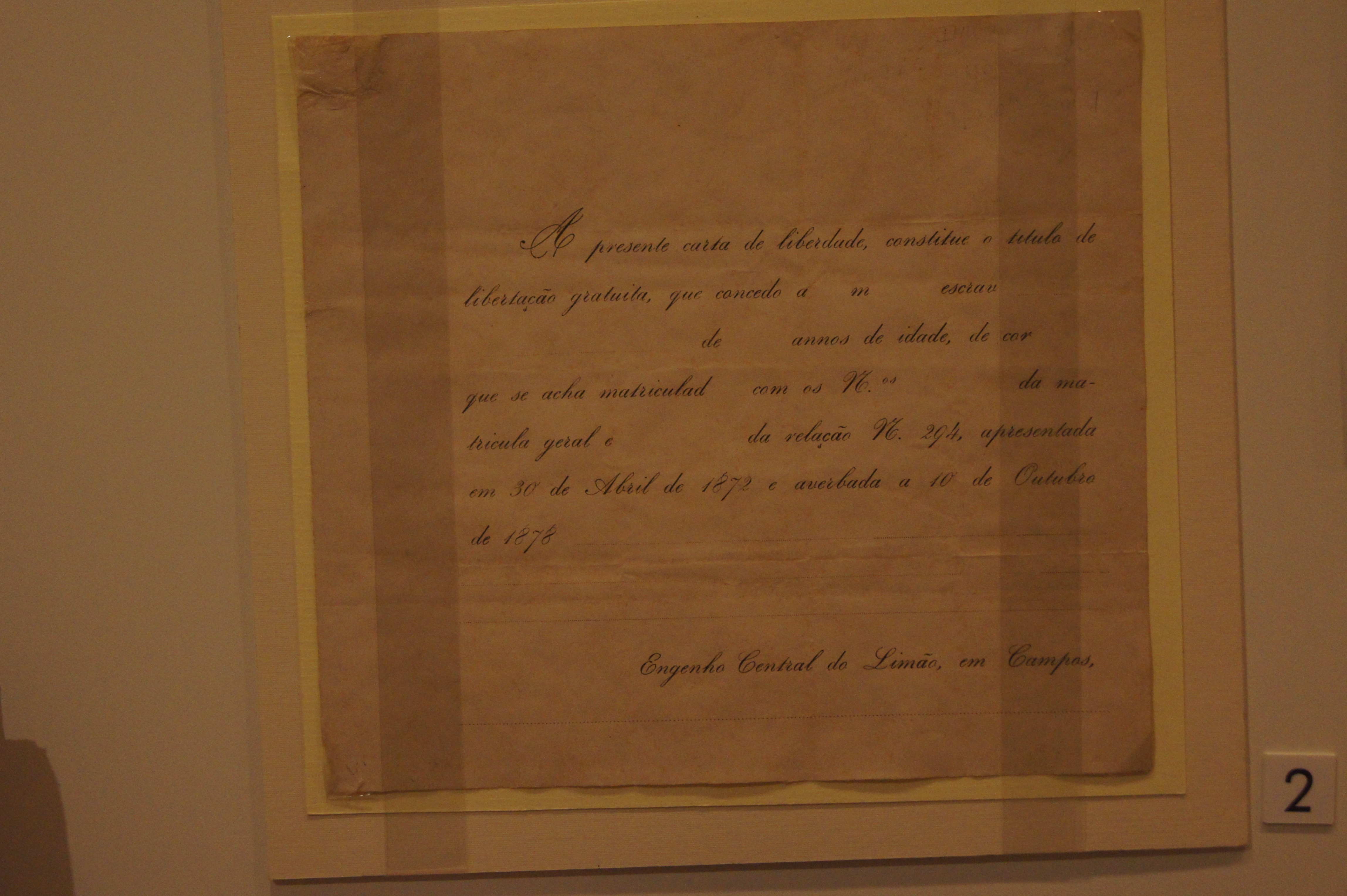 CARTA DE ALFORRIA MODELO EM BRANCO COM DATA DE VALIDADE DE 1872 ATE 1878 COM PROCEDENCIA DO ENGENHO CENTRAL DO LIMÃO NA CIDADE DE CAMPOS, RIO DE JANEIRO. 1872 Brasil